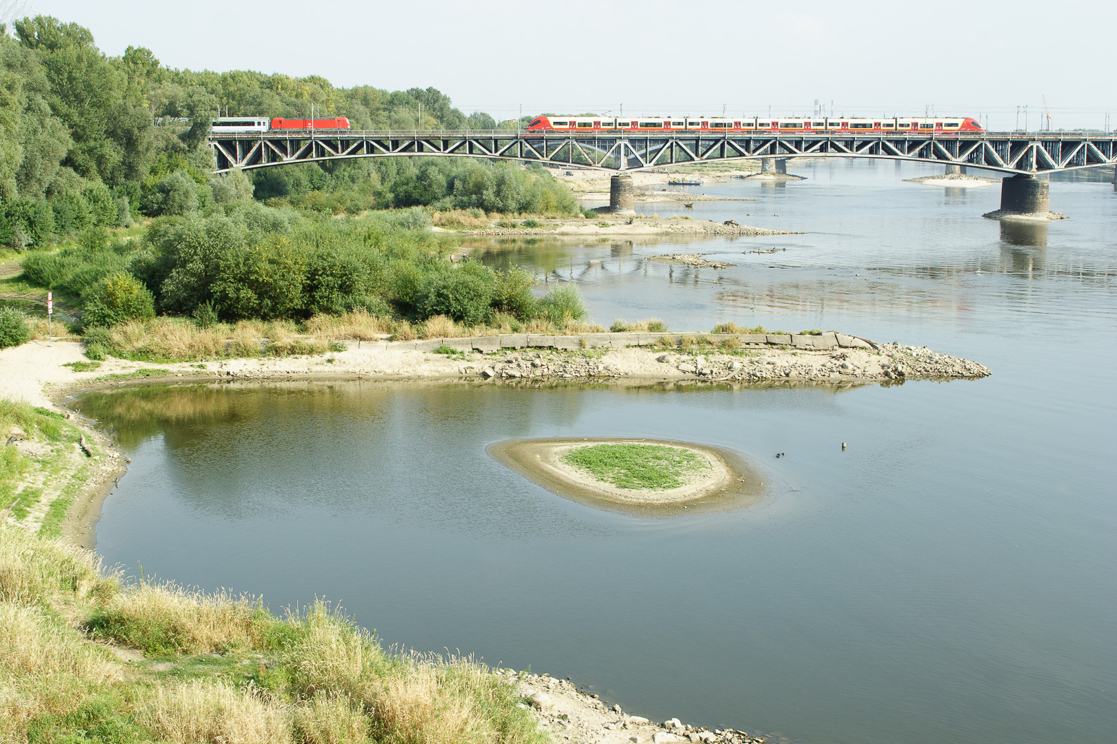 Tamy poprzeczne (ostrogi) na Wiśle w Warszawie. Widok z Mostu Świętokrzyskiego. W głębi most kolejowy (średnicowy). This is a photography of Natura 2000 protected area with ID PLB140004